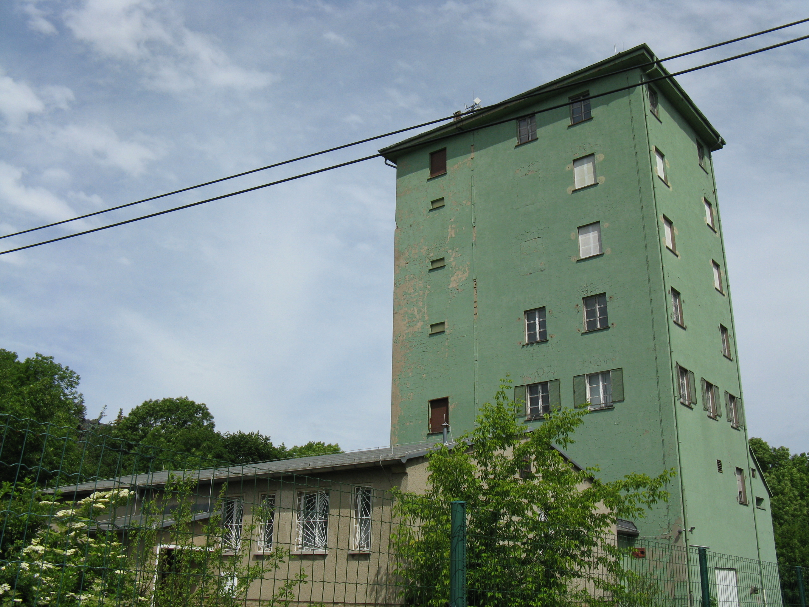 Der A-Turm auf dem Petersberg, während der Zeit des Kalten Krieges Bezirksrichtfunkzentrale Halle/S der Partei (SED)